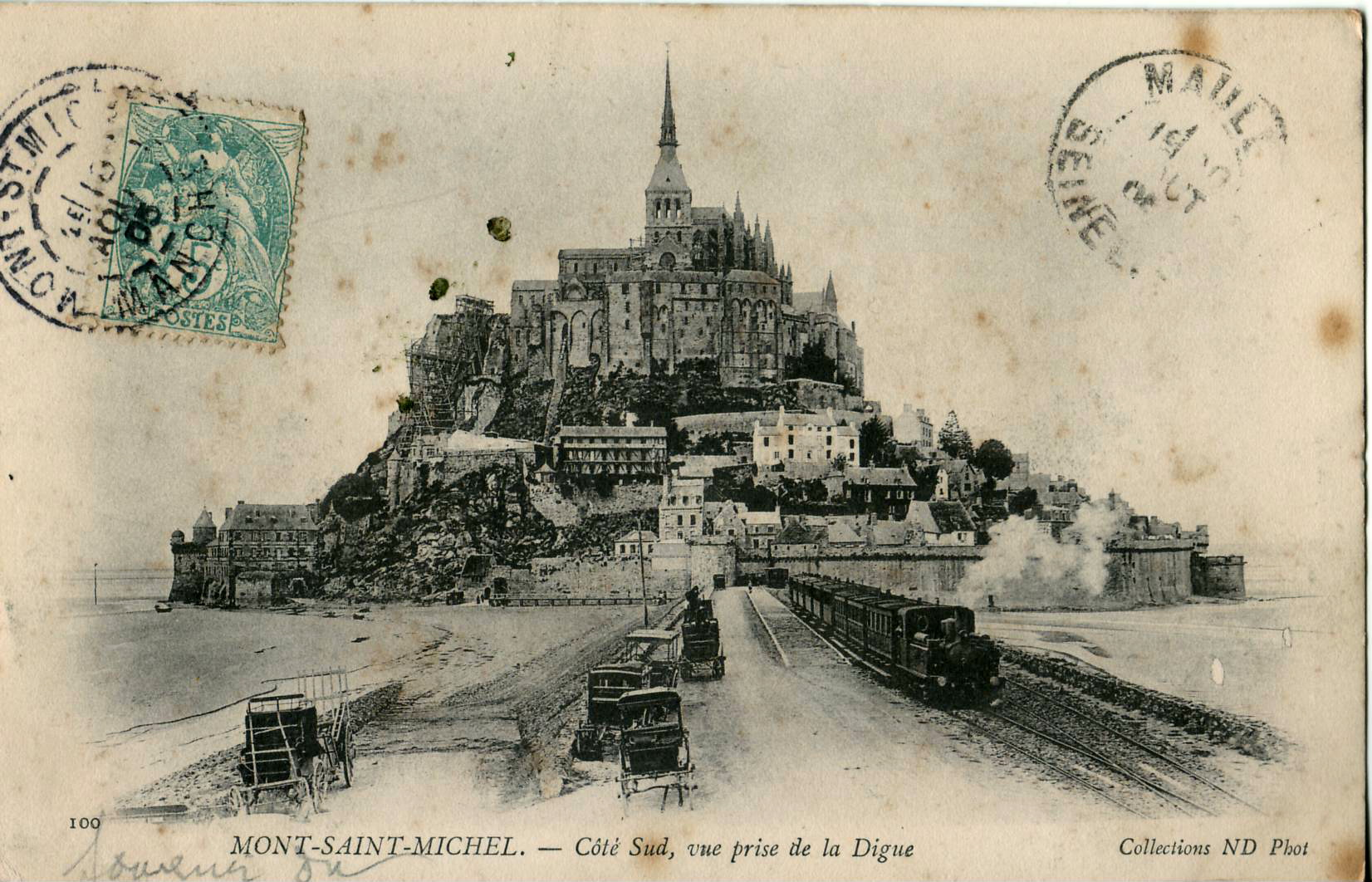 Carte postale ancienne éditée par ND, n°100 : LE MONT-SAINT-MICHEL - Côte Sud, vue prise de la Digue.